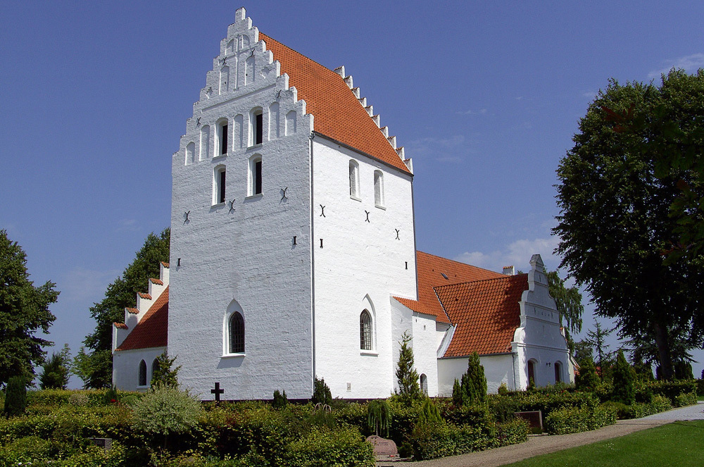 fra sydvest